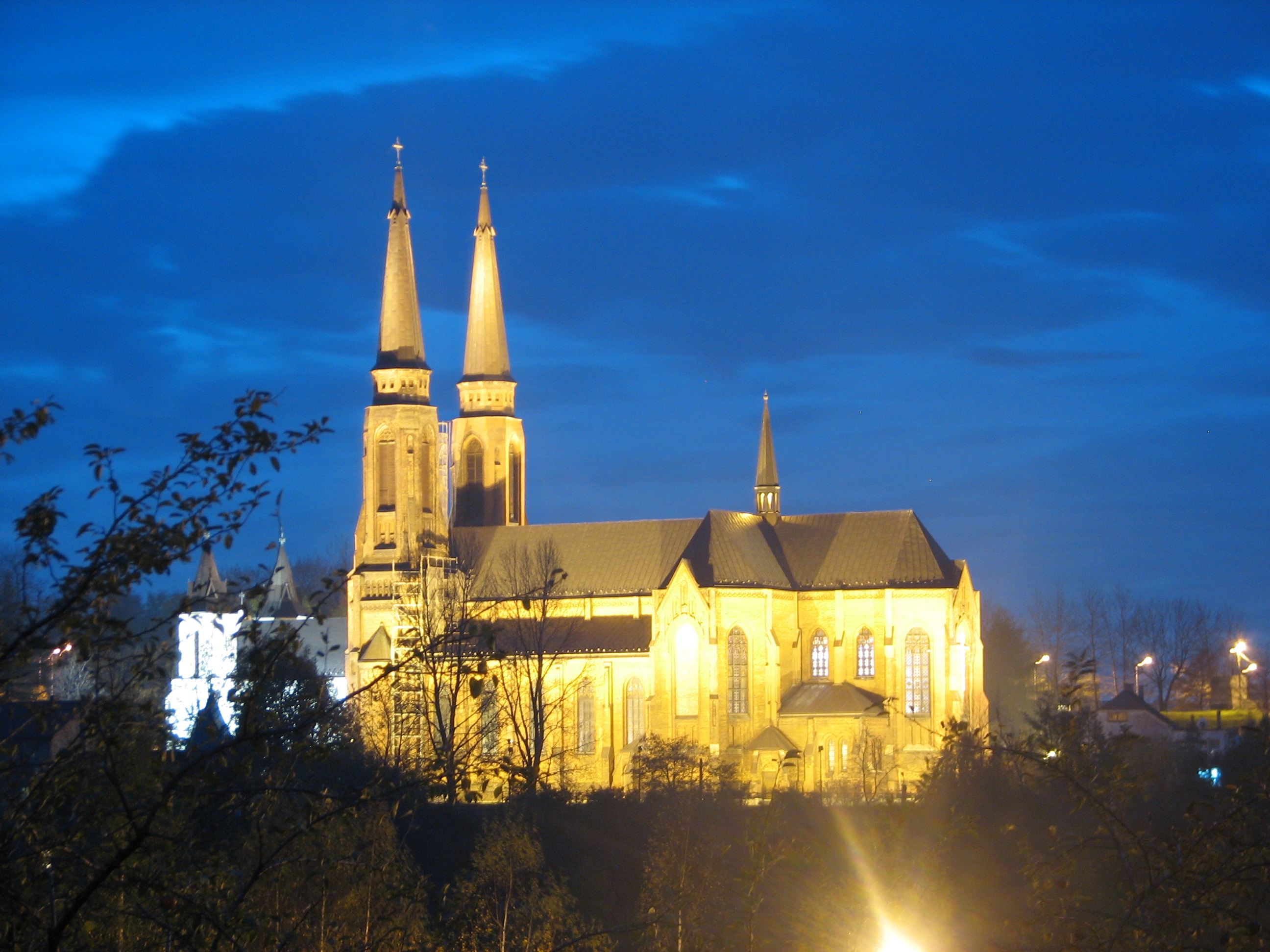 Kościół Świetego Joachima w Sosnowcu Zagórzu.